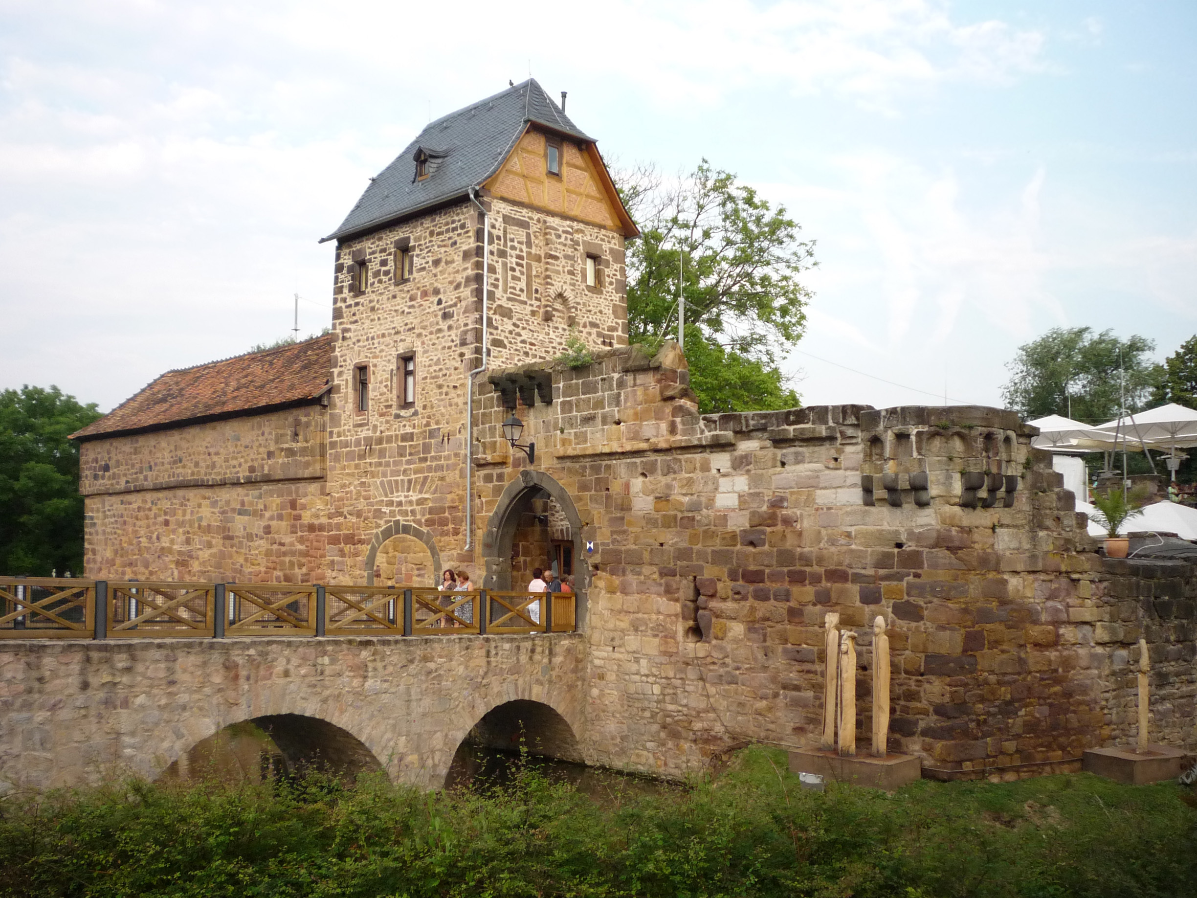 Wasserburg - Burg-Ruine, 12. bis 13. Jahrhundert erbaut, 1399 zerstört.